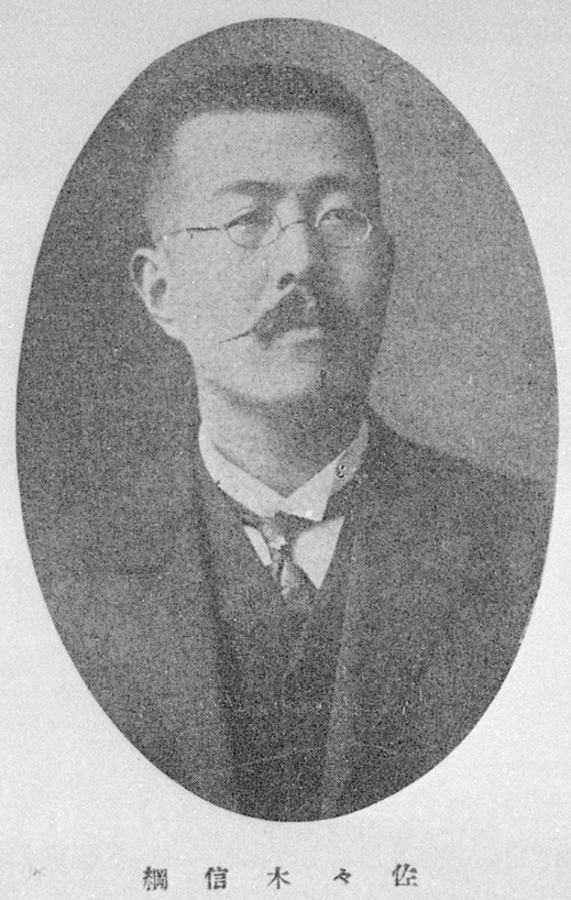 Portrait of Sasaki Nobutsuna (佐佐木信綱, 1872 – 1963)